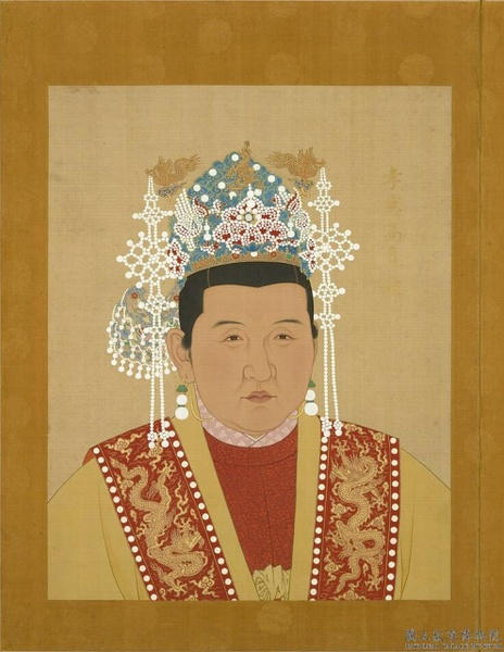 中文（中国大陆）: 作者已经去世超过200年，作品已经进入公有领域。